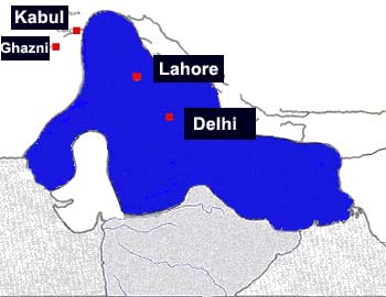 Indien, karta, Delhisultanatet under Iltutmish, egentillv.